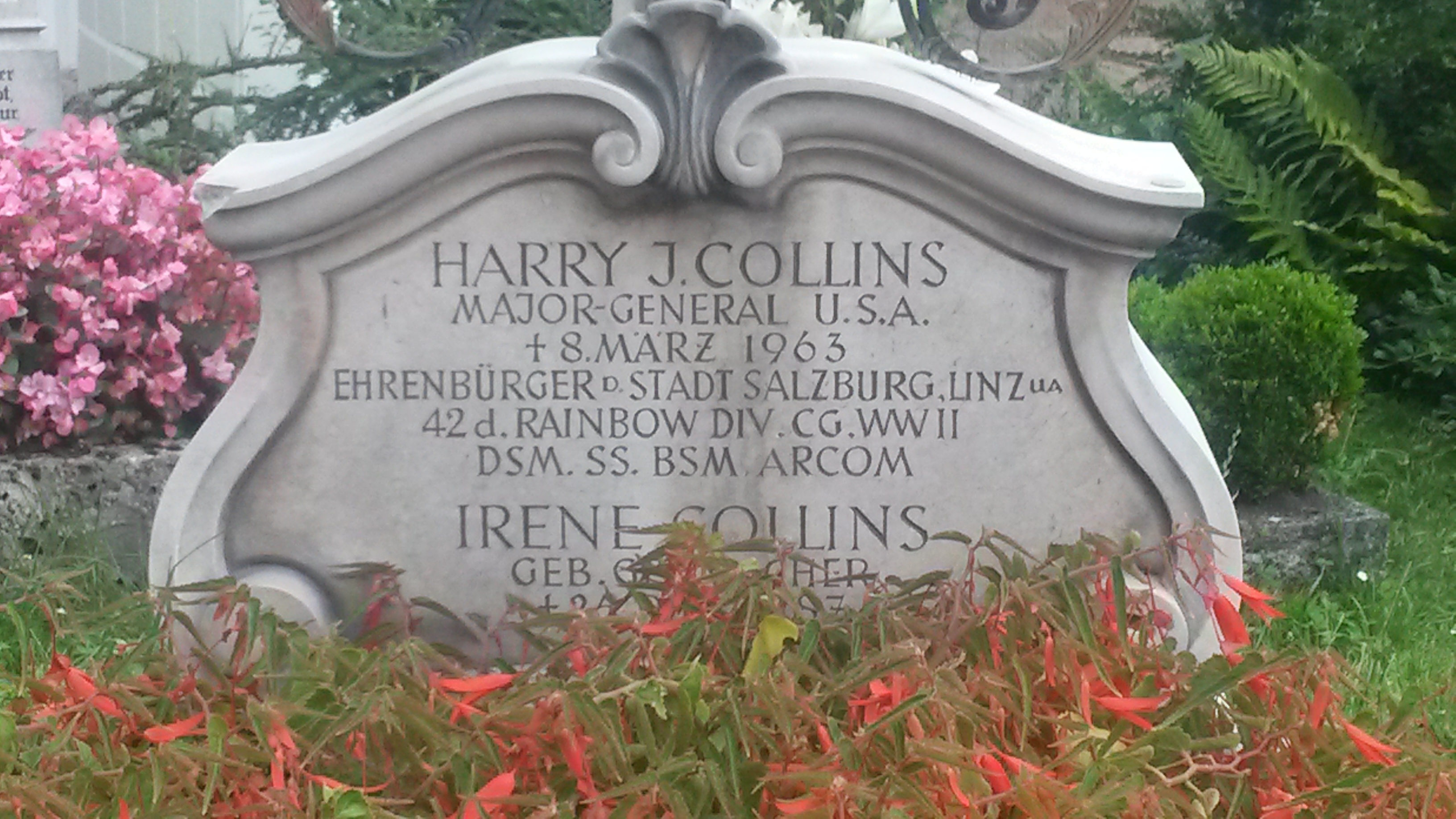 Grabstein von General Harry J. Collins und seiner Frau in Salzburg